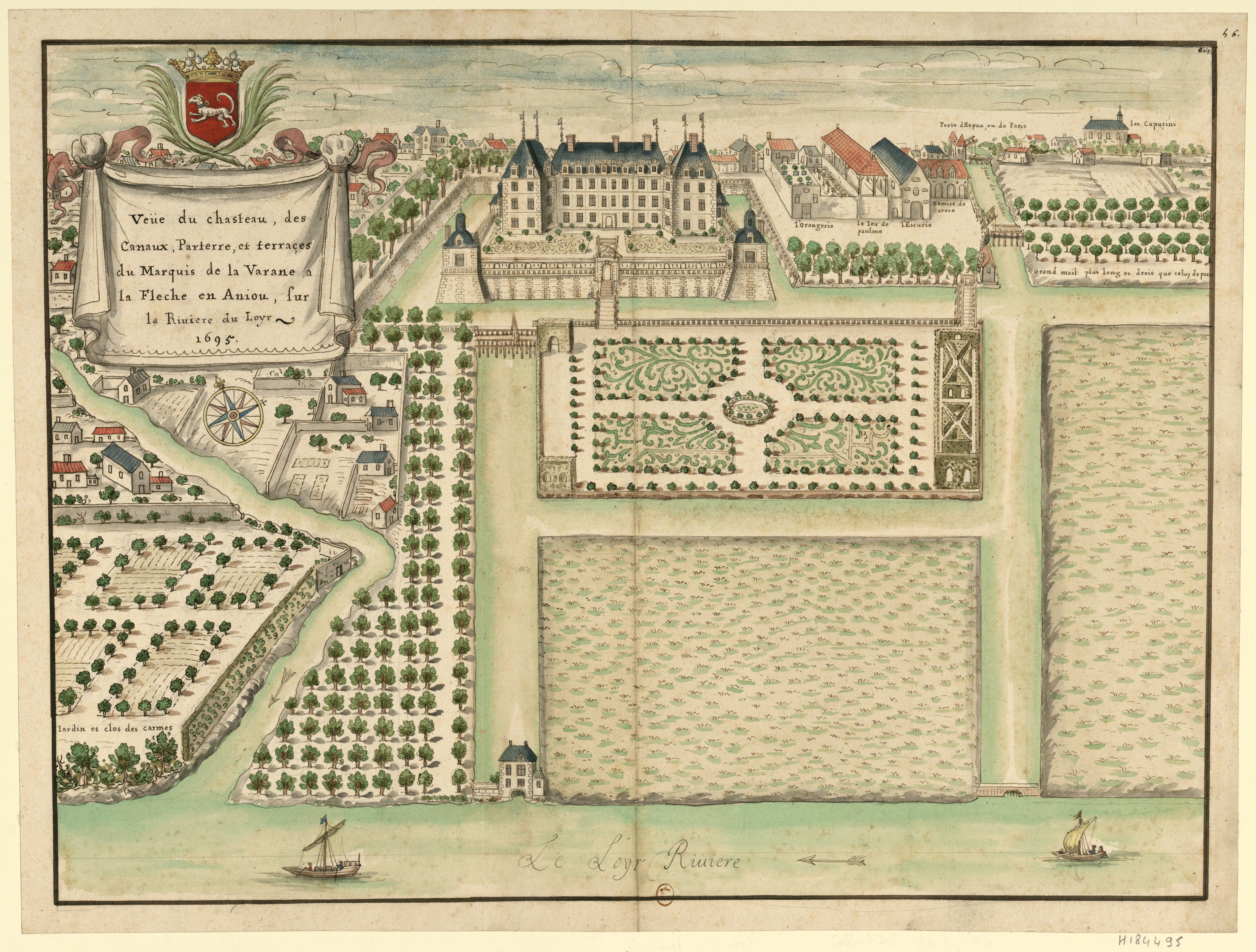 "Veüe du chasteau, des canaux, parterre et terraces du Marquis de la Varane a La Fleche en Anjou, sur la Rivière de Loyr ", dessin de Louis Boudan de 1695